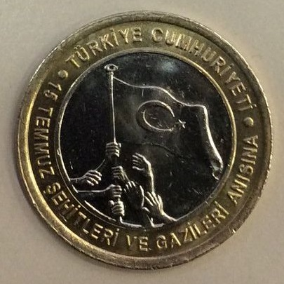 Fethullahçı Terör Örgütü (FETÖ/PDY) mensuplarıncan bulunulan 15 Temmuz 2016 Türkiye askeri darbe girişimi sonrası Türkiye Cumhuriyet Merkez Bankası tarafından "15 Temmuz gazi ve şehitleri" anısına belli kotada basılan demir 1 liralar.